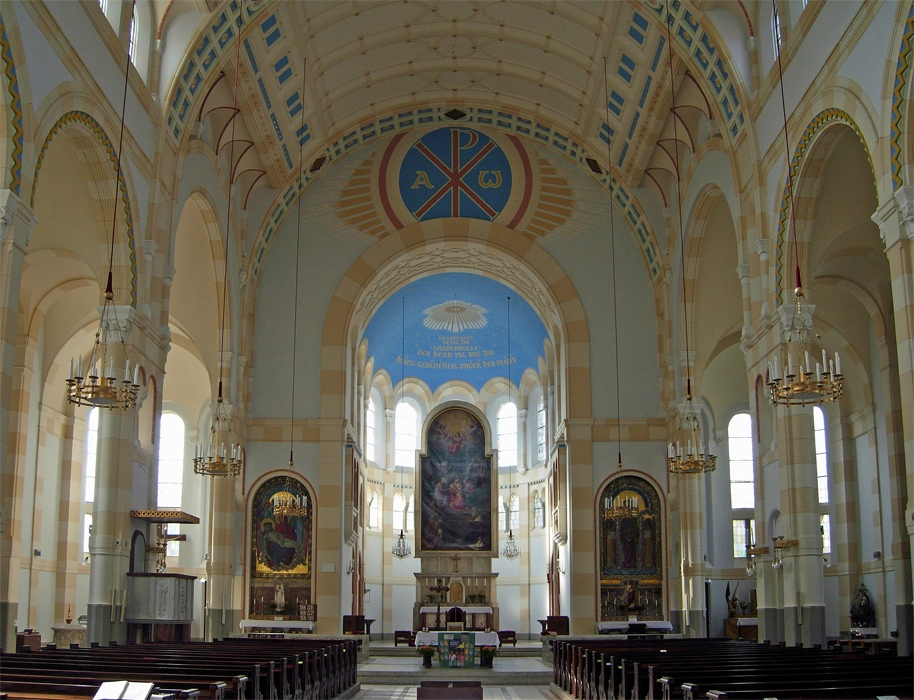 Neusimmeringer Pfarrkirche, Wien